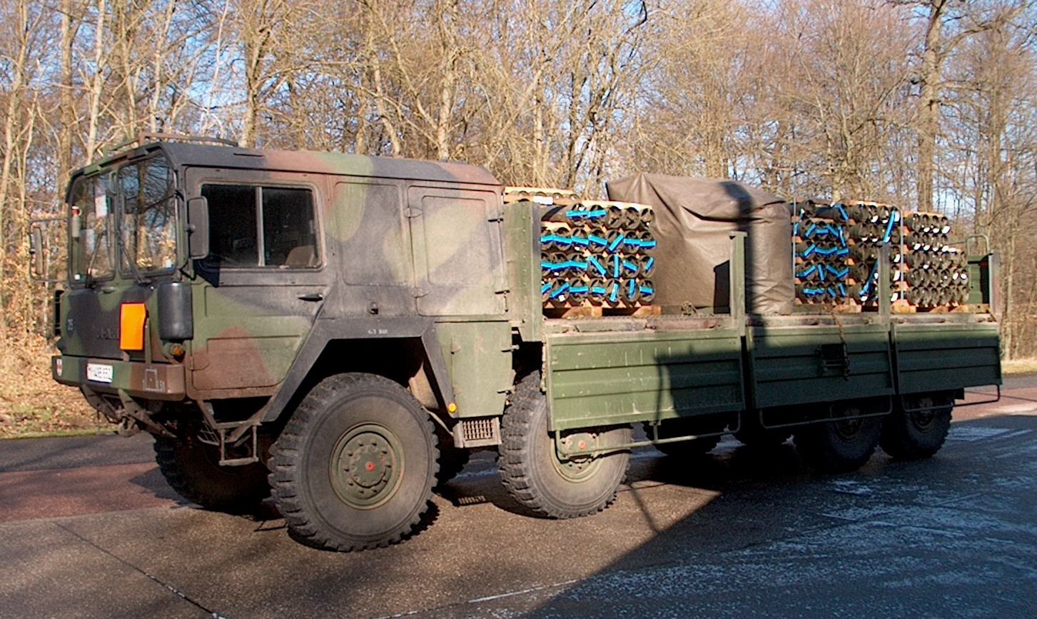 MAN 10to gl mit Artillerietreibladungen